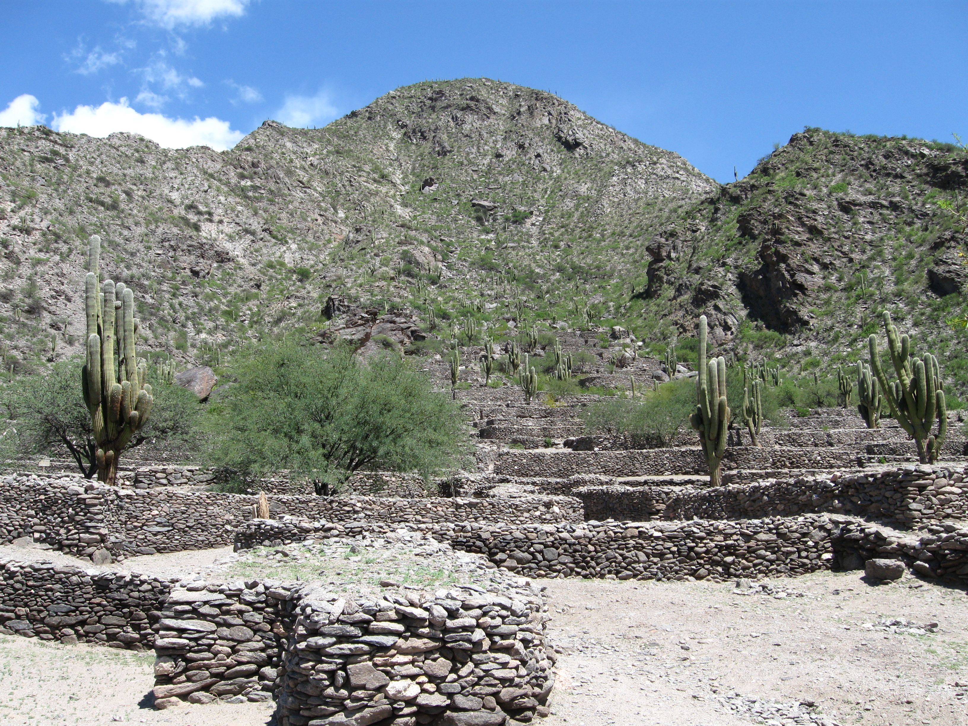 Vista de Frente de las Ruinas de Quilmes